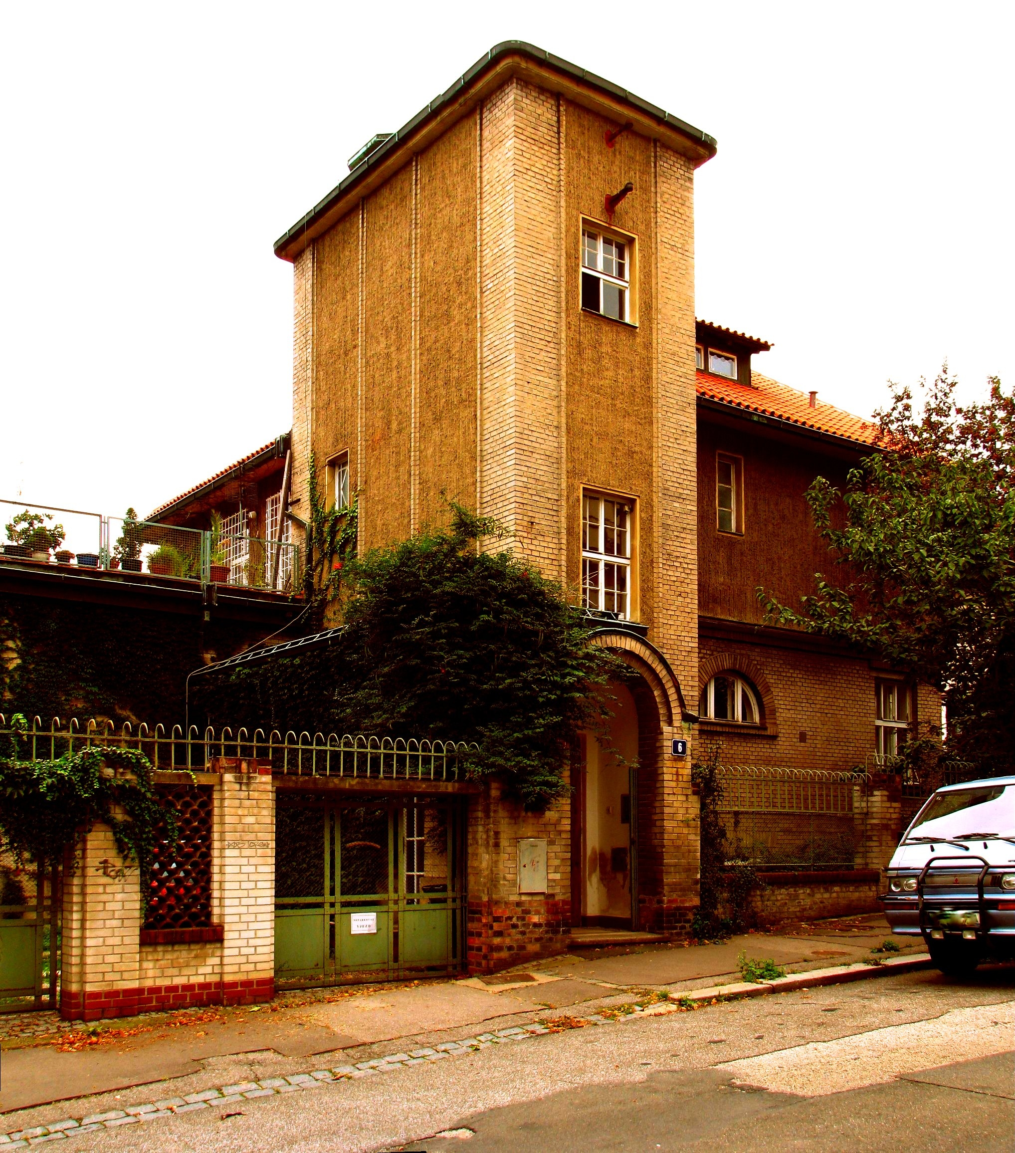 Kotěrova vila, Praha 10-Vinohrady, Hradešínská 1542/6